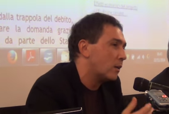 Emiliano Brancaccio in una conferenza a Roma (2015)